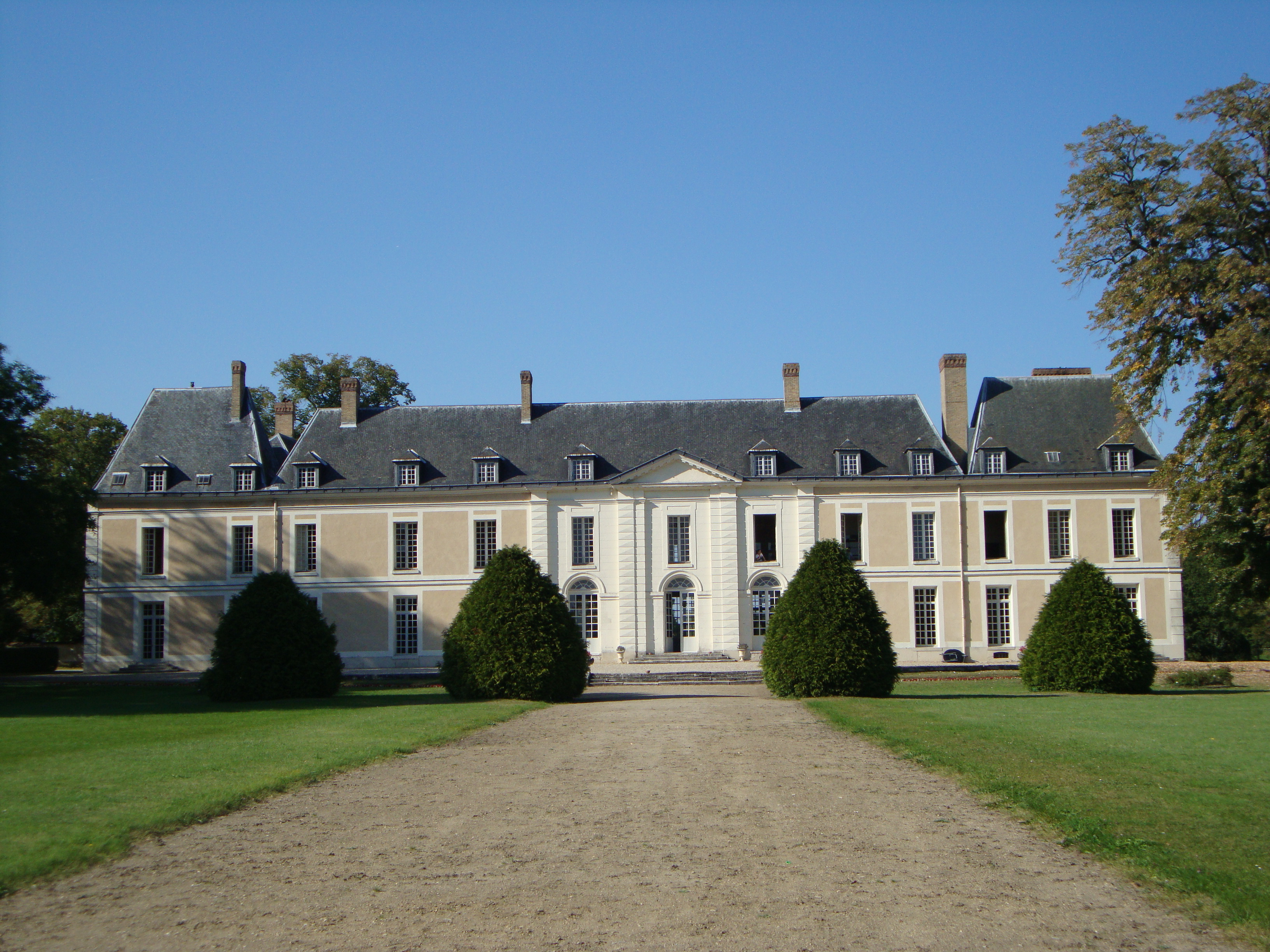 L88 - Château de Brou-sur-Chantereine - Vue de l'avant .